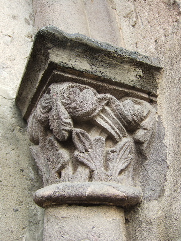 Kommende Ramersdorf, Kapitell des mittelalterlichen Portals